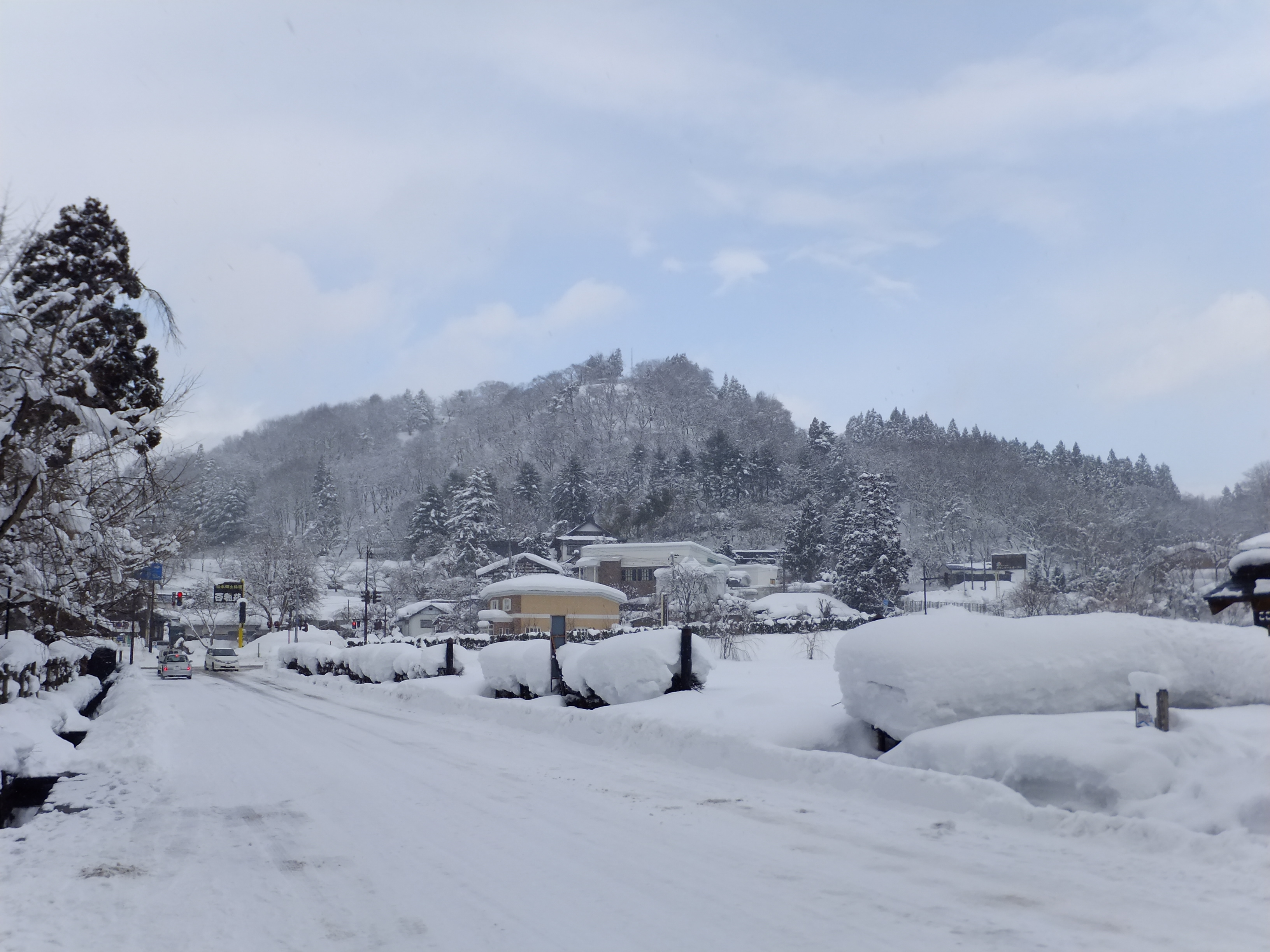 かつて角館城があったとされる古城山。